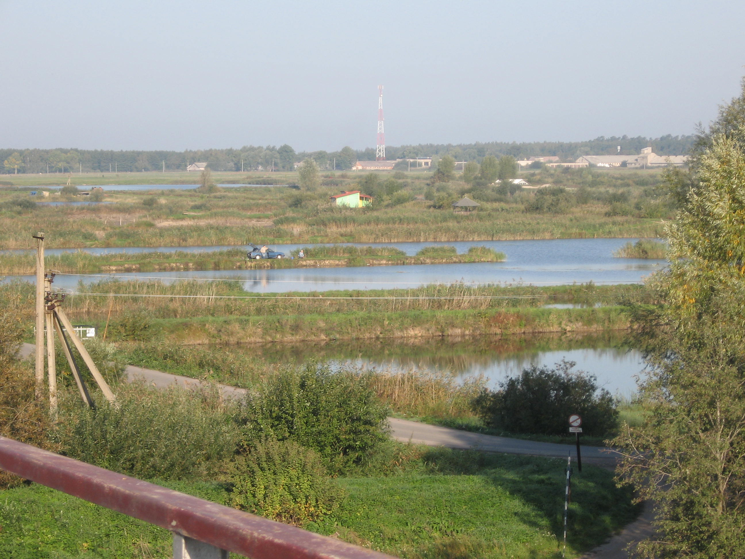 Kintų apylinkės, UAB "Kintai" žuvininkystės ūkis